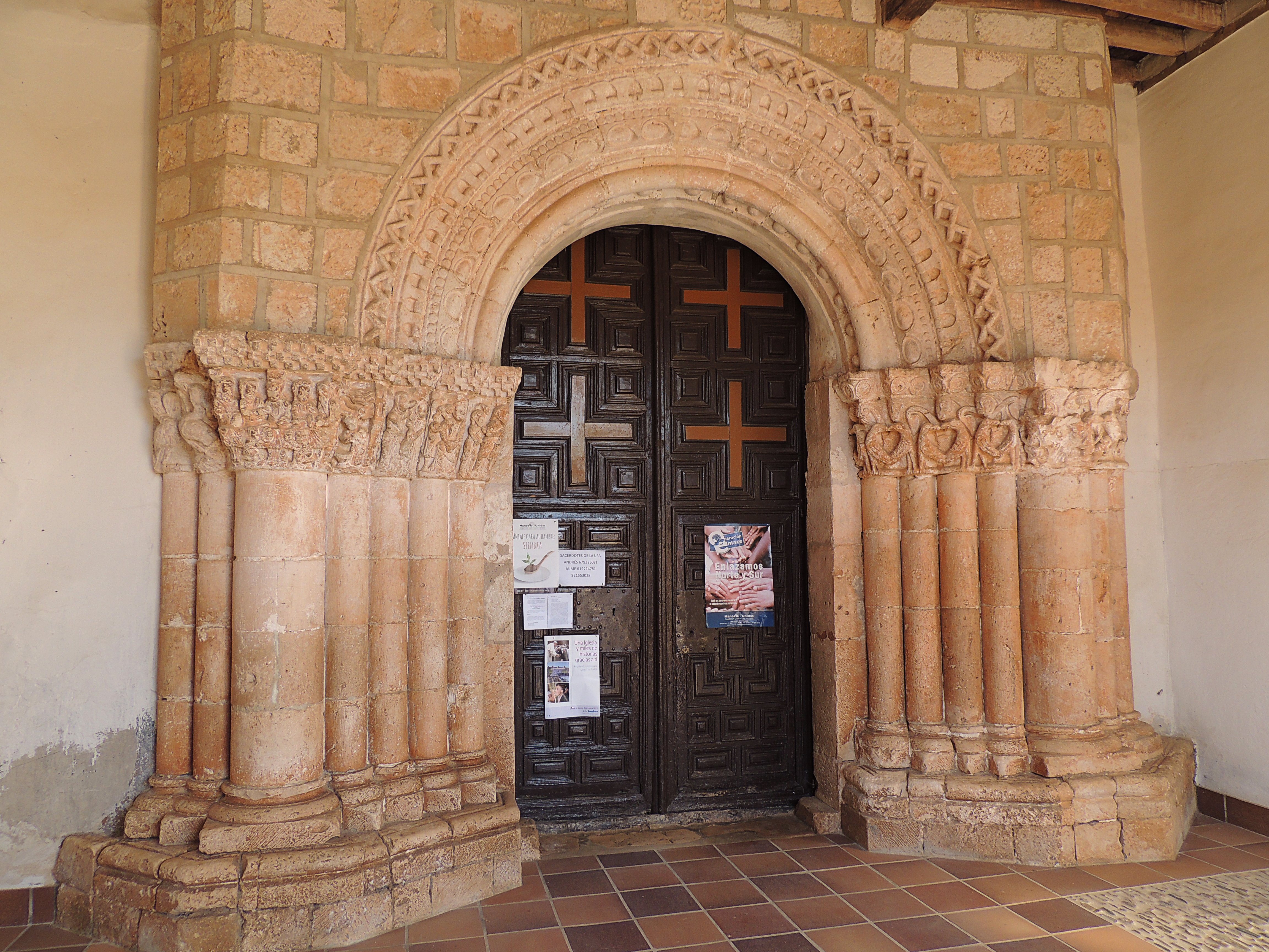 Languilla - Iglesia de San Miguel Arcángel